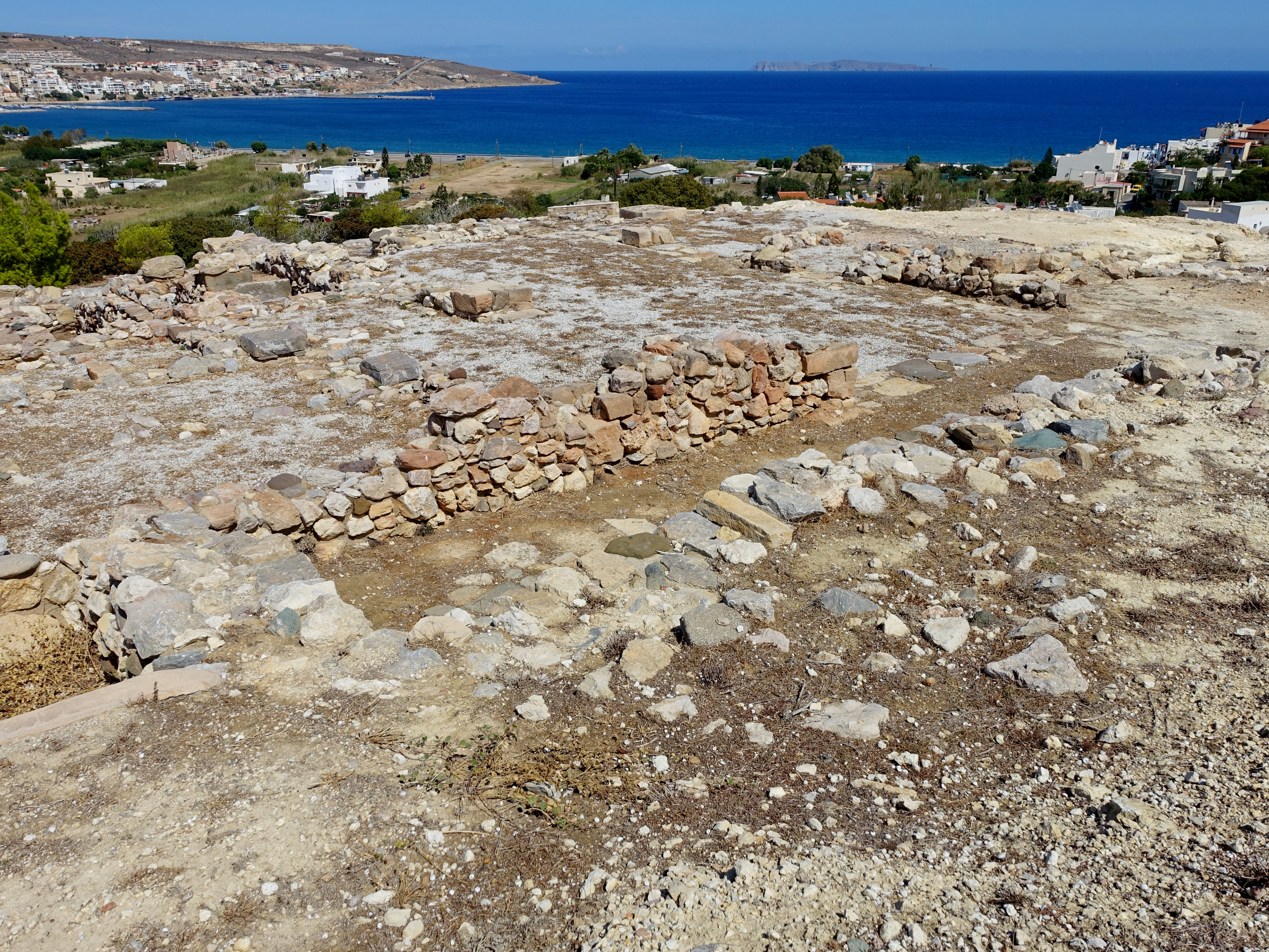 Minoische Ausgrabungsstätte von Petras (Πετράς), Gemeinde Sitia, Kreta, Griechenland